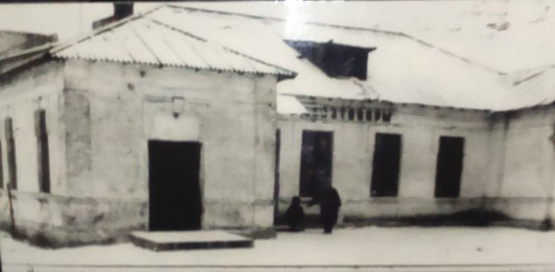 У цій будівлі в 1925 році розміщувалася лікарня.